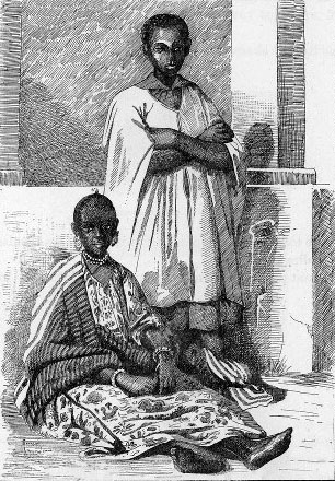 Un prince sarrakholais et sa captive (illustration de Côte occidentale d'Afrique du Colonel Frey, fig. 56, p. 93)